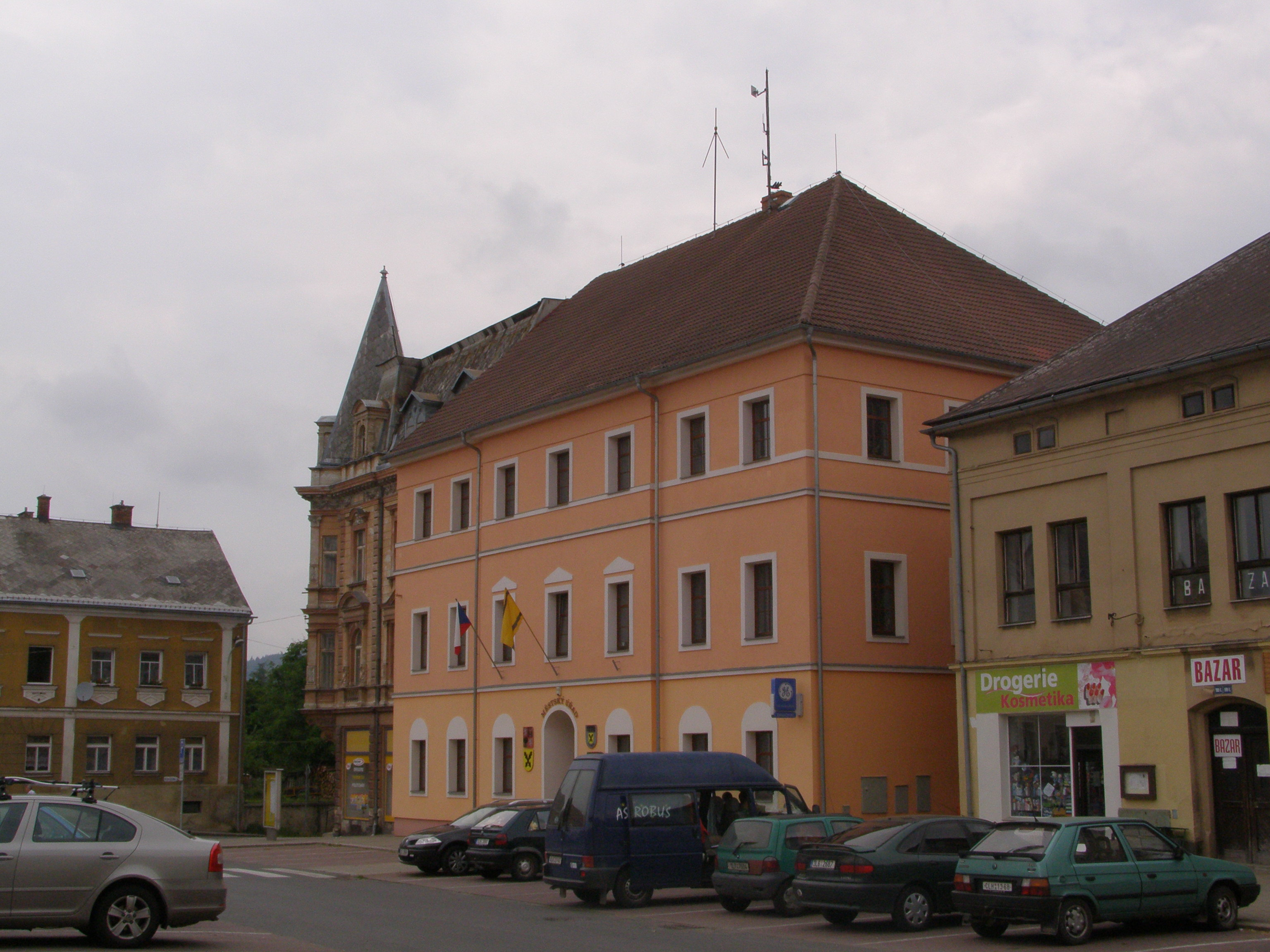 Česky: Cvikov, náměstí Osvobození, městský úřad